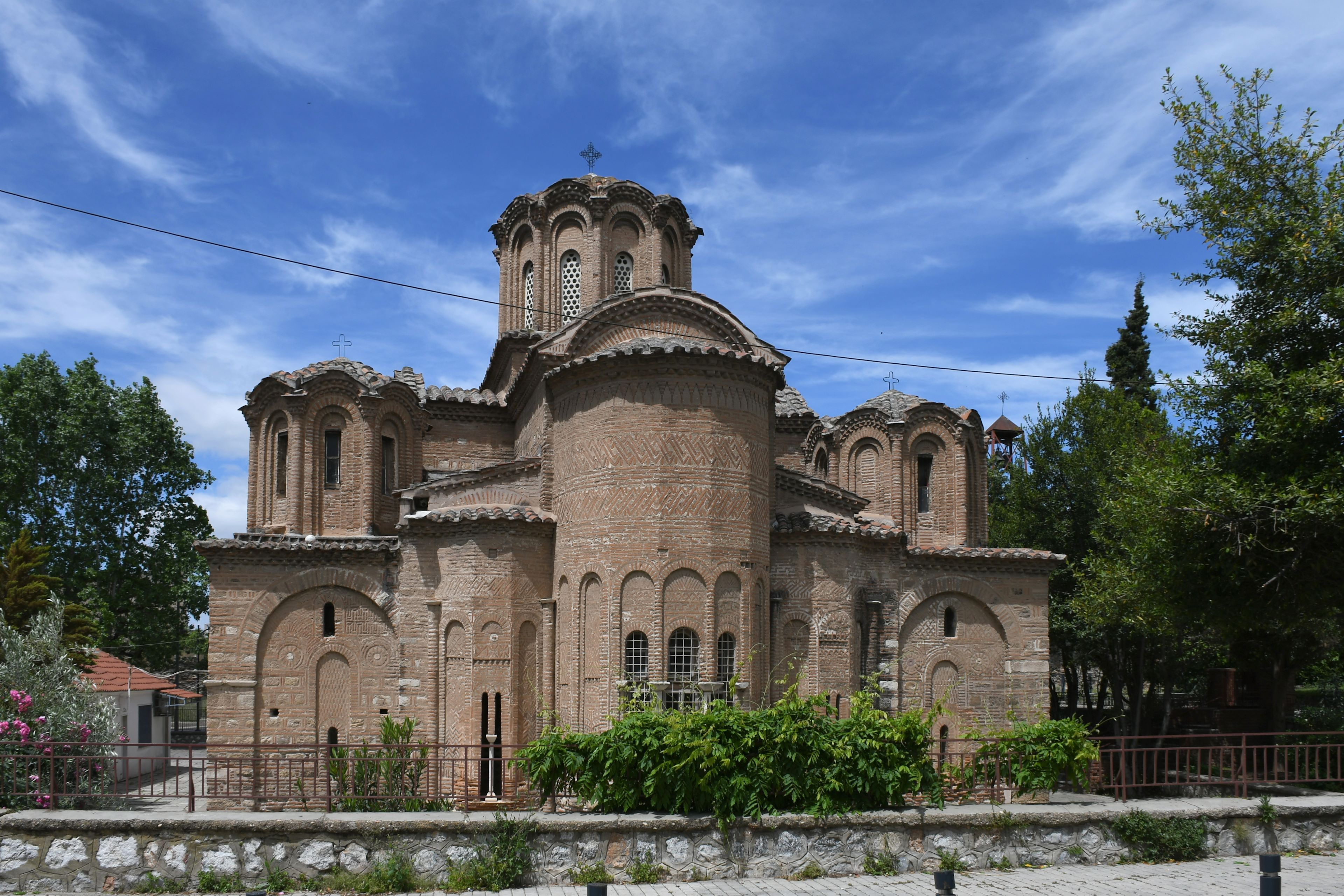 Thessaloniki, Kirche der Heiligen Apostel (Ναός Αγίων Αποστόλων) (14. Jhdt.)